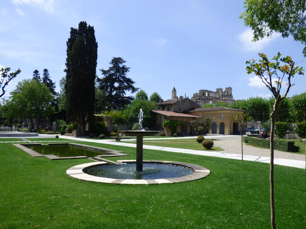 Jardin Ortholan d'Auch